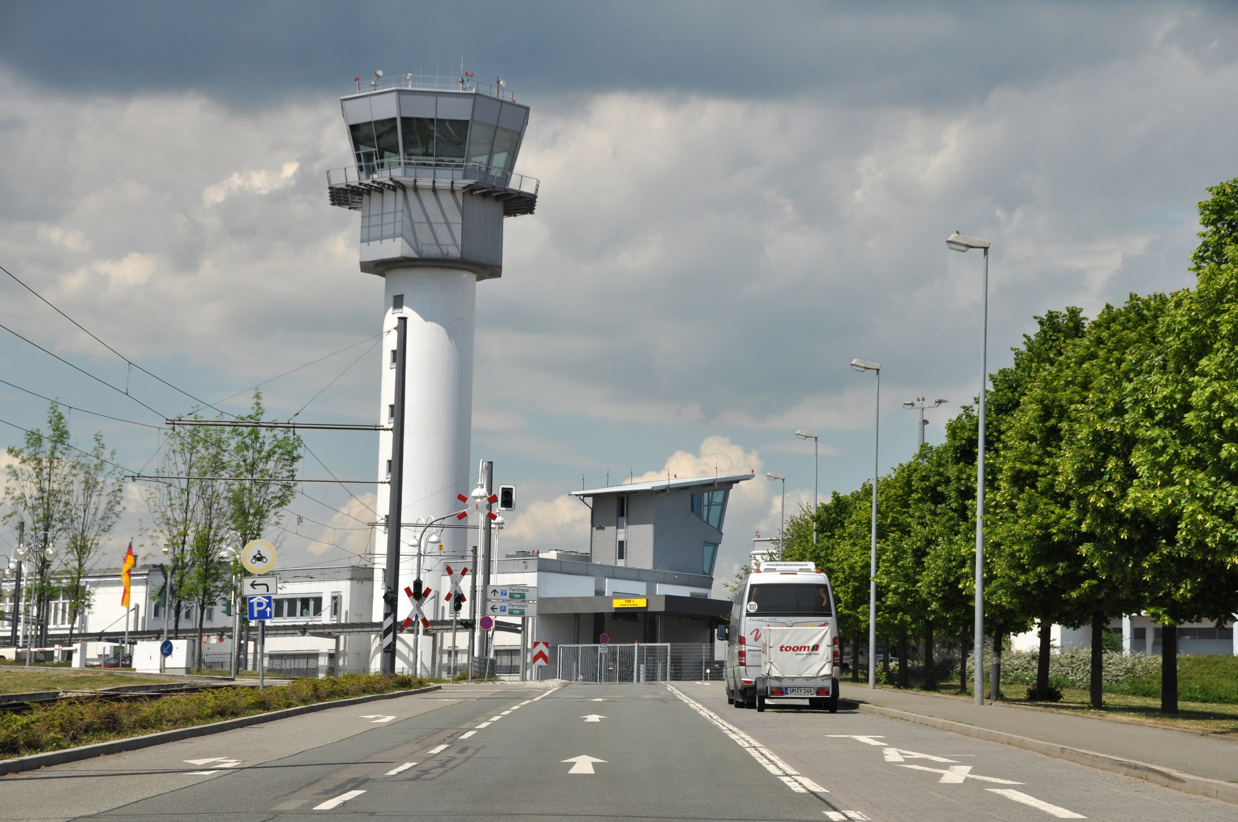 Flughafen Erfurt-Weimar